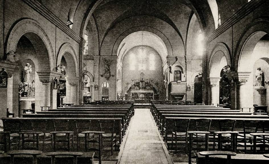 Chapelle des Sœurs servantes de Marie, 7 rue Duguay-Trouin à Paris. Elle a été détruite dans les années 1960.